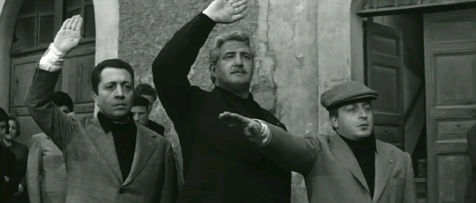 Tieri-Carotenuto-Croccolo in una scena del film Gli eroi del doppio gioco